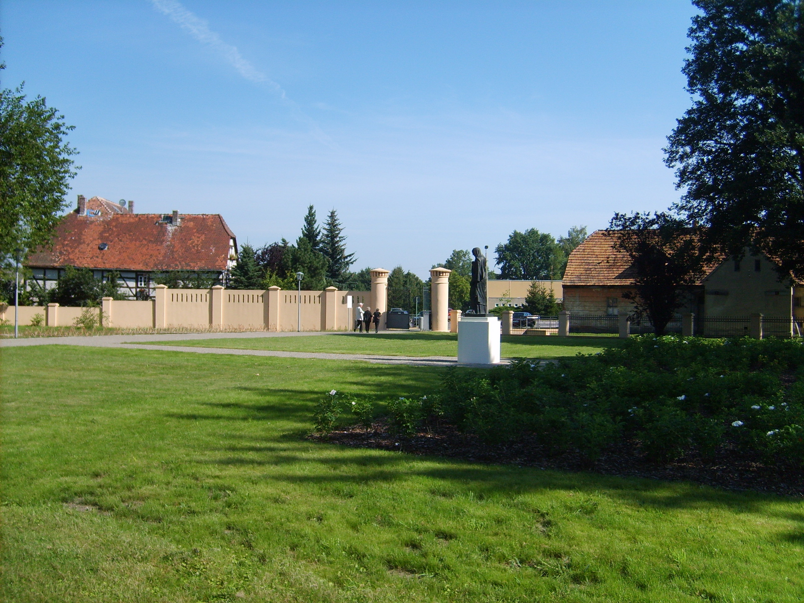 Schlosspark-lauchhammer-West